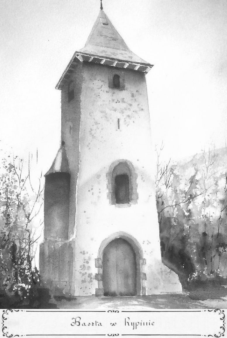 Pocztówka z 1908 r. Baszta w Rypinie z XIV w. (Baszta Rypin), rozebrana w 1868 r.